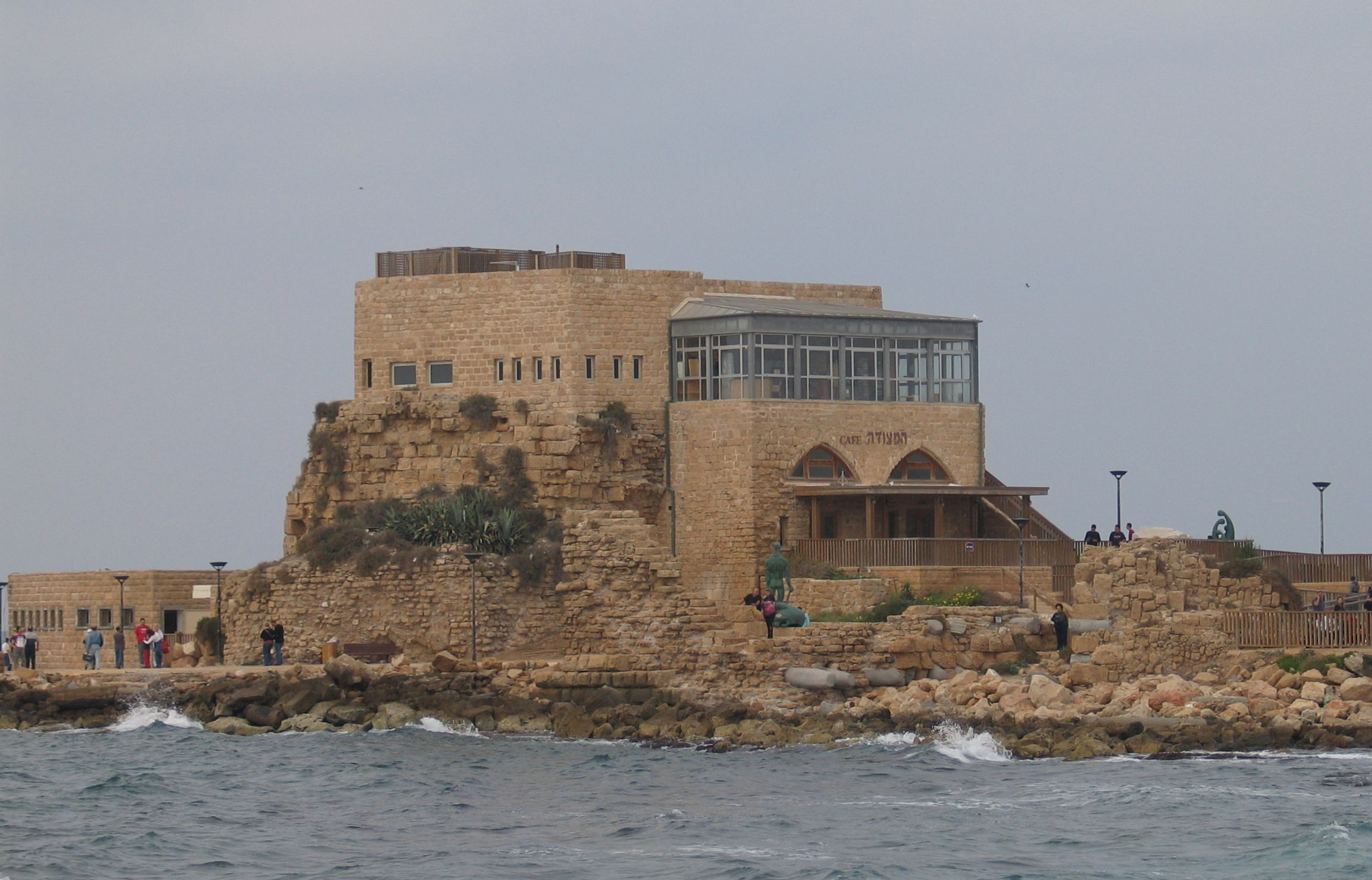 Caesarea Maritima, Israel.